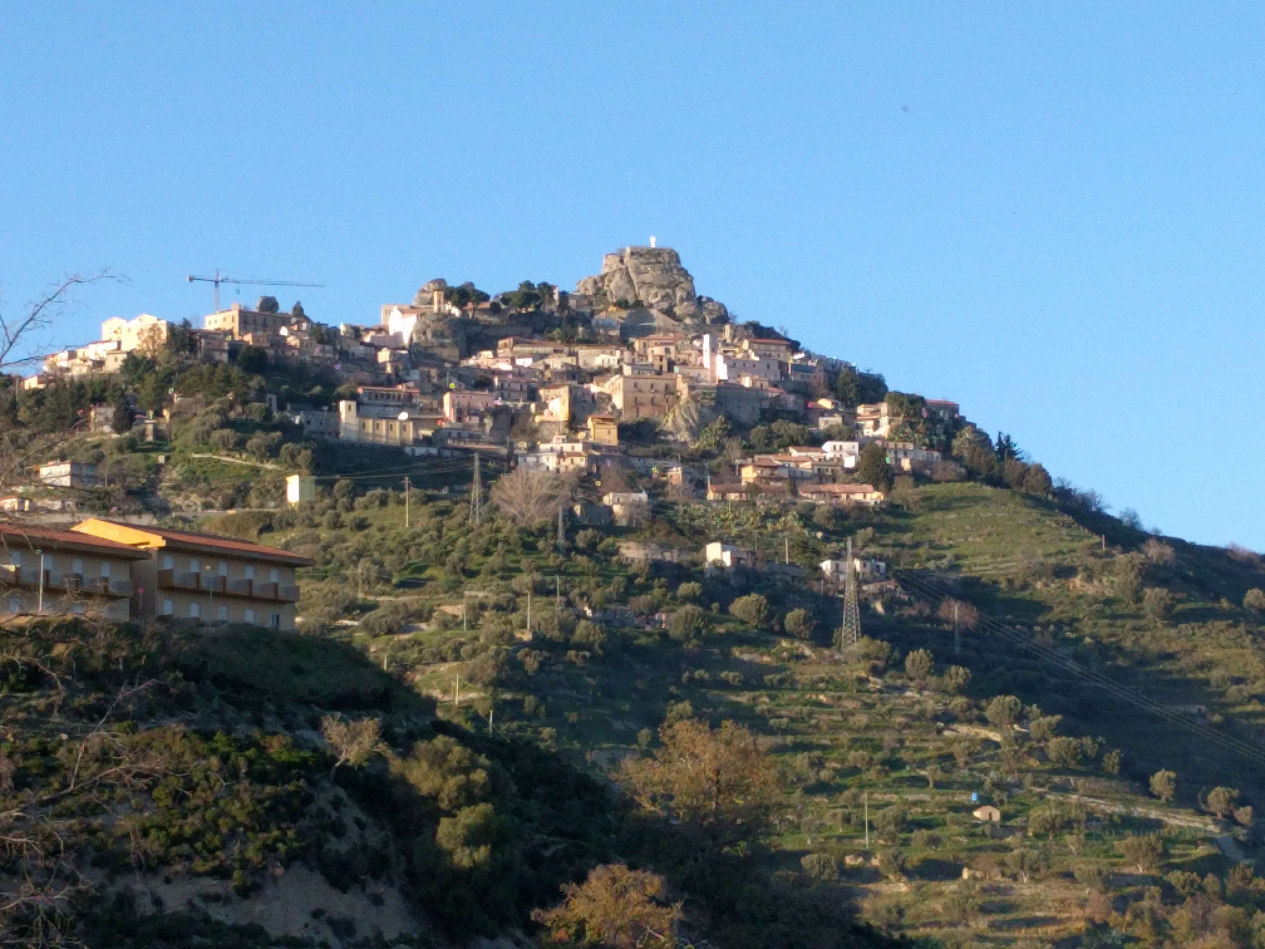 Panoràmica de Bova (Calàbria)